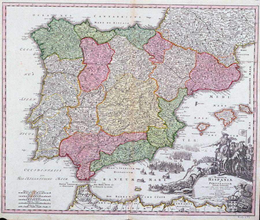 Mapa de España y Portugal de 1710, donde se puede diferenciar entre Andalucía (en rosa) y el Reino de Granada (en verde).